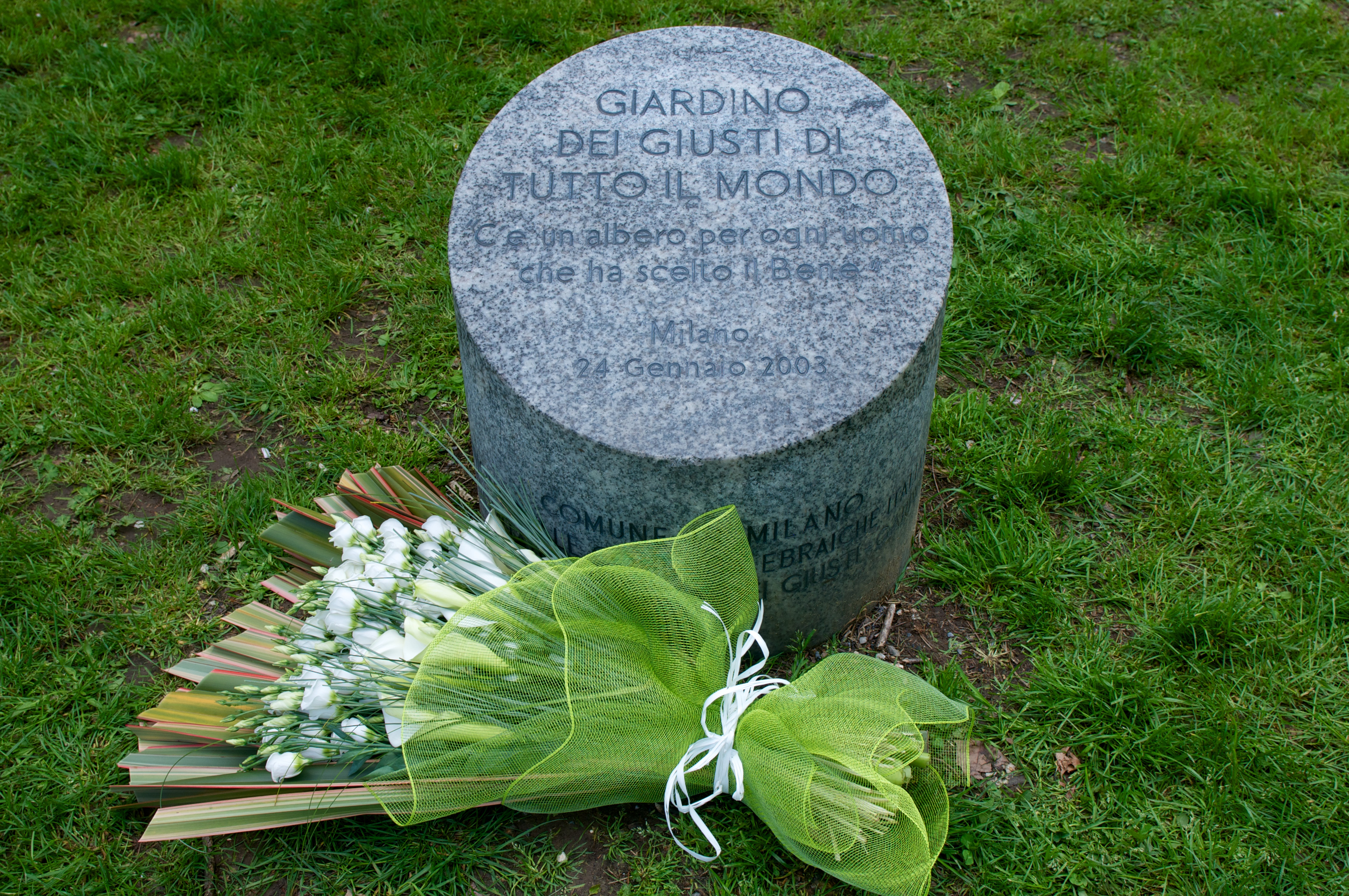 Cippo centrale del Giardino dei Giusti di tutto il mondo di Milano